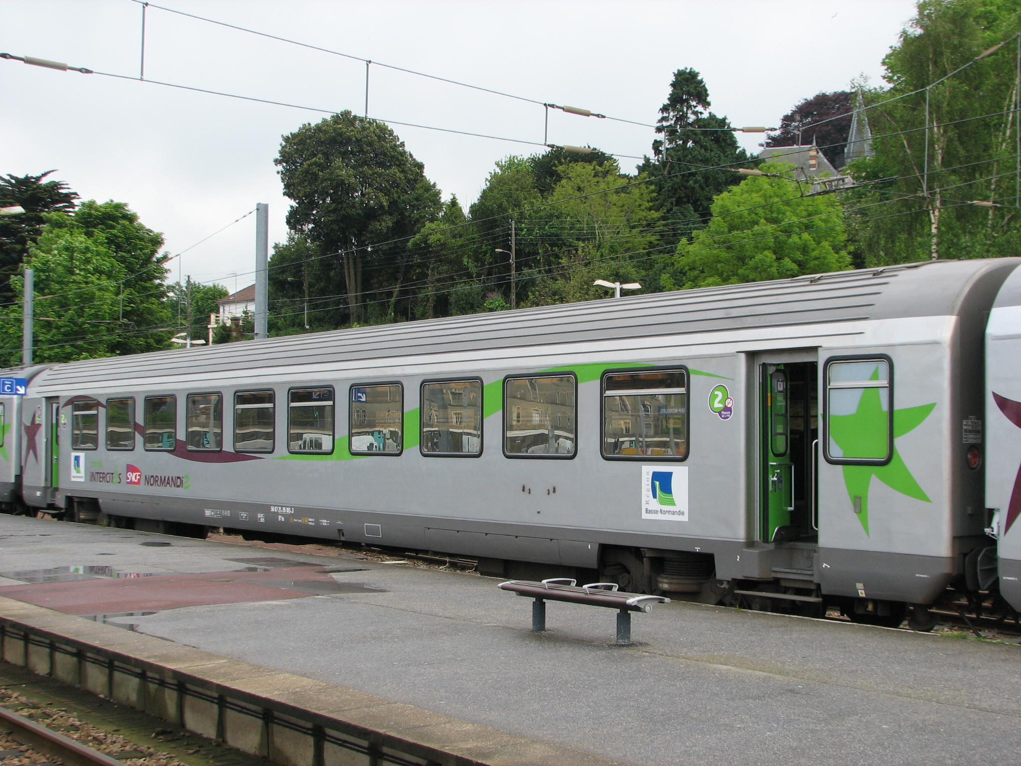 Train Corail Intercité Normandie à la Gare SNCF à Cherbourg